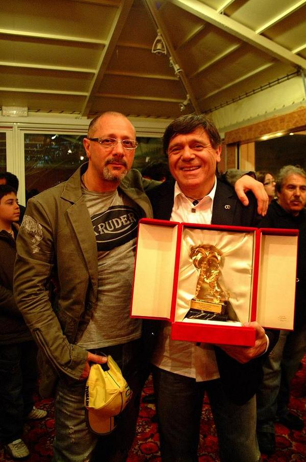 Il Maestro Santori e Beppe Carletti con il Premio per la vittoria nei Gruppi a Sanremo 2006